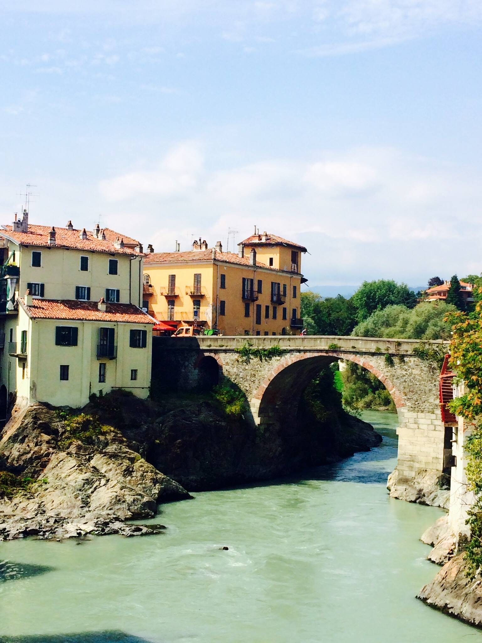 Ponte Vecchio Ivrea